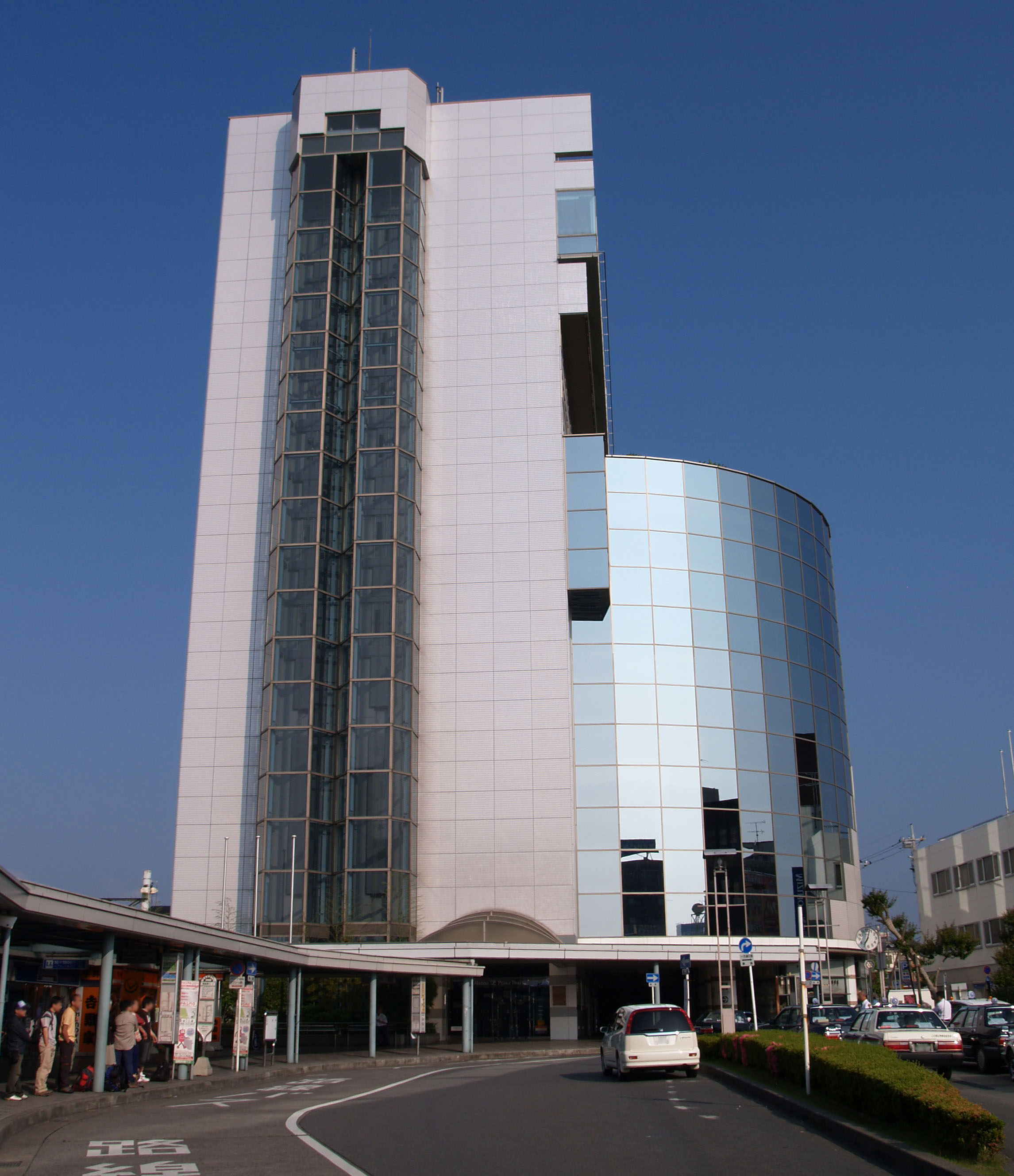 飯能駅北口